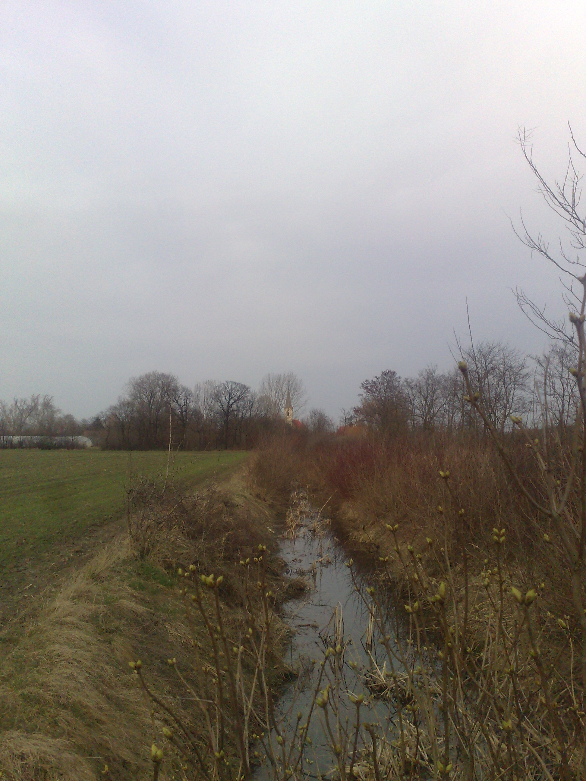 A Buga-csatorna Egyed község határában